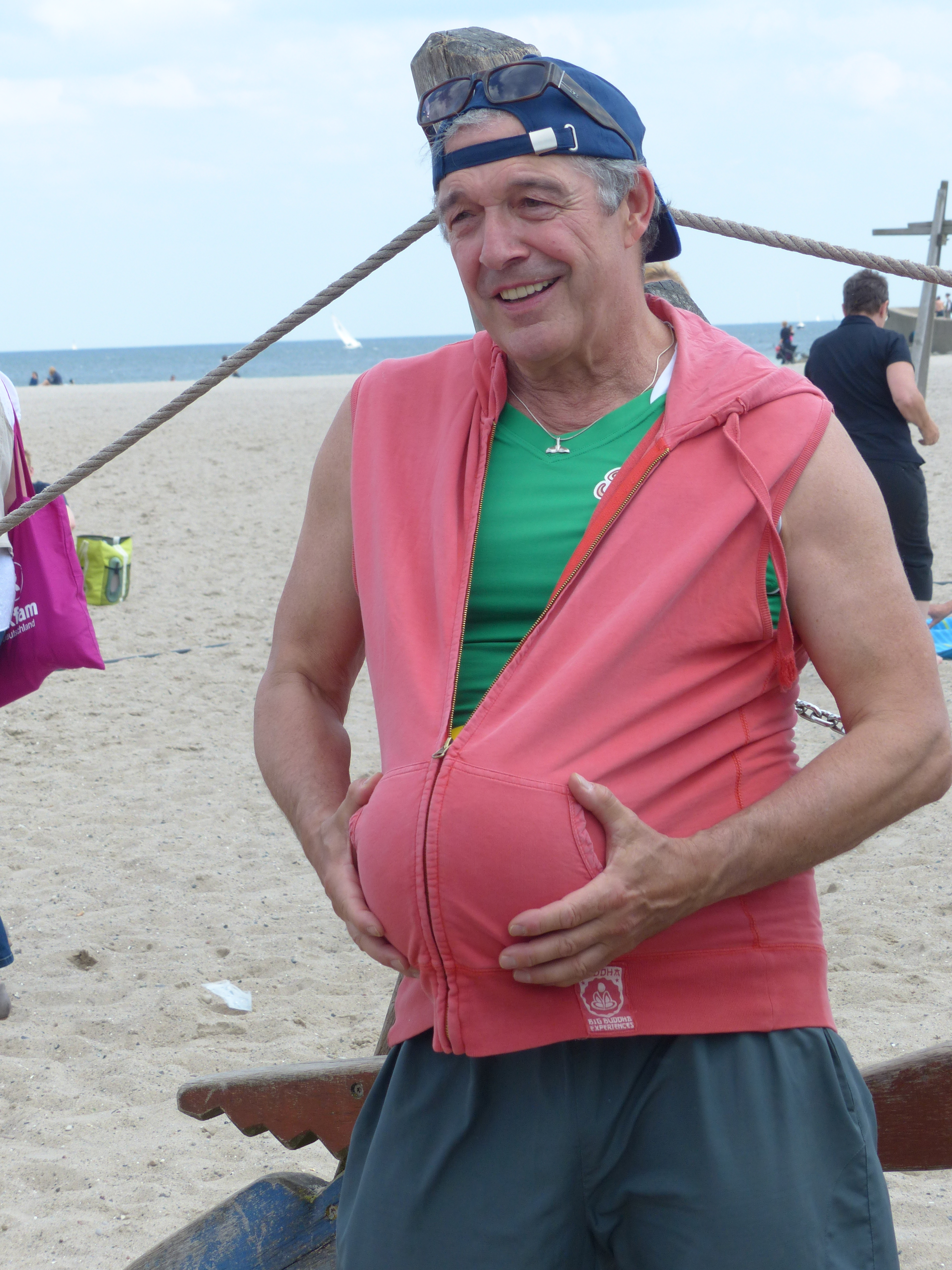 Joachim Lätsch beim Fotoshooting, Beachvolleyball-Starcup 2013